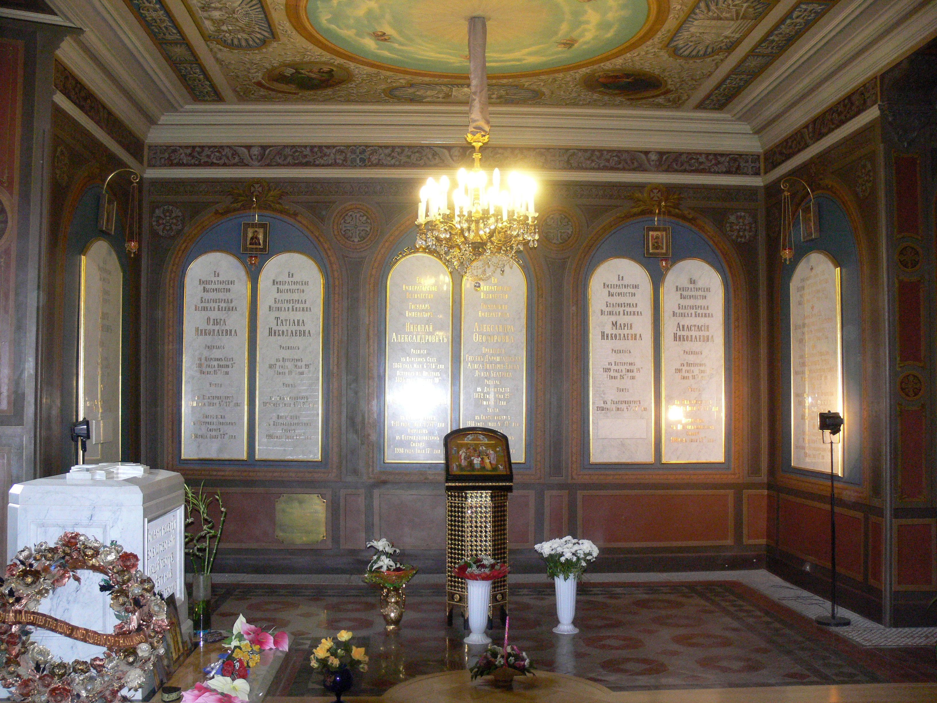 Grabkapelle der Romanows linke Seite